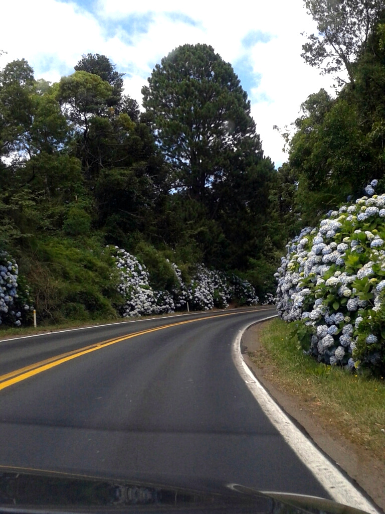 Rota Romântica - Hortências